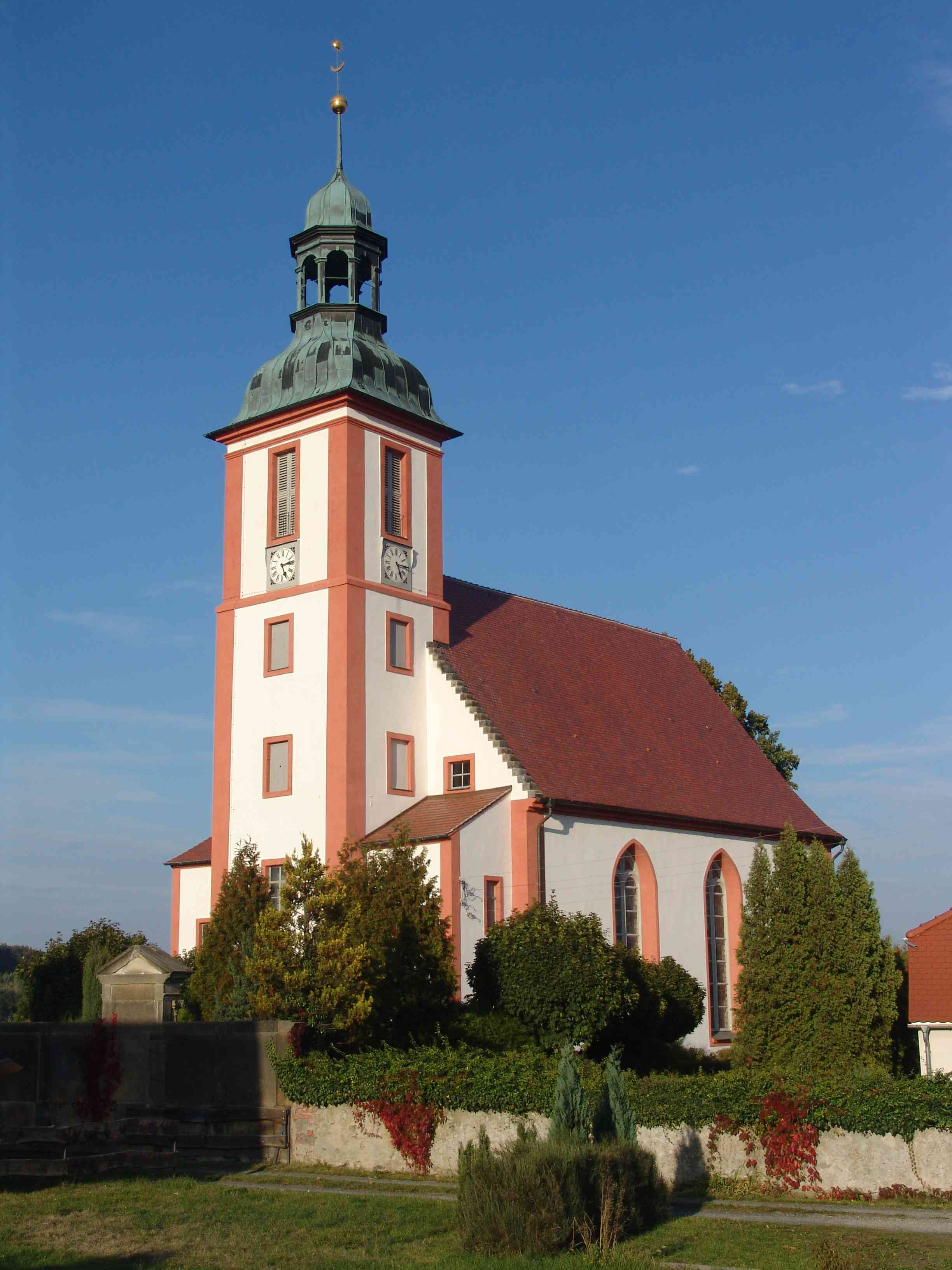 Spitzkunnersdorfer Kirche (Gemeinde Leutersdorf, Landkreis Löbau-Zittau, Sachsen)